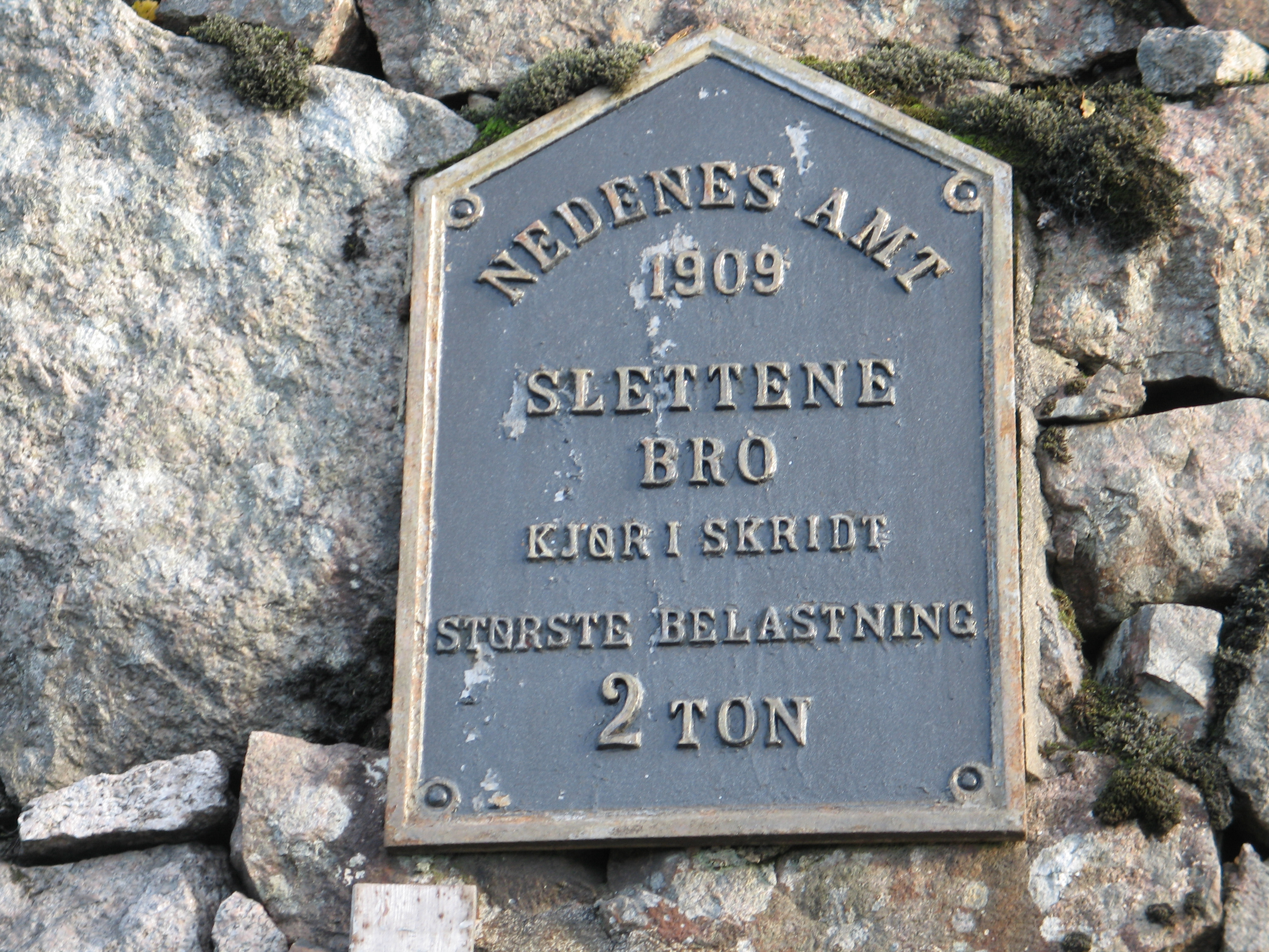 Slettene bru i Birkenes i Aust-Agder